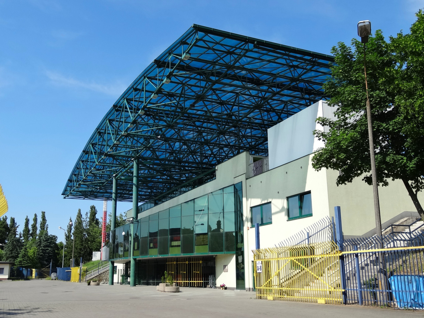 Stadion Polonii Bydgoszcz - widok od frontu (strona zachodnia)